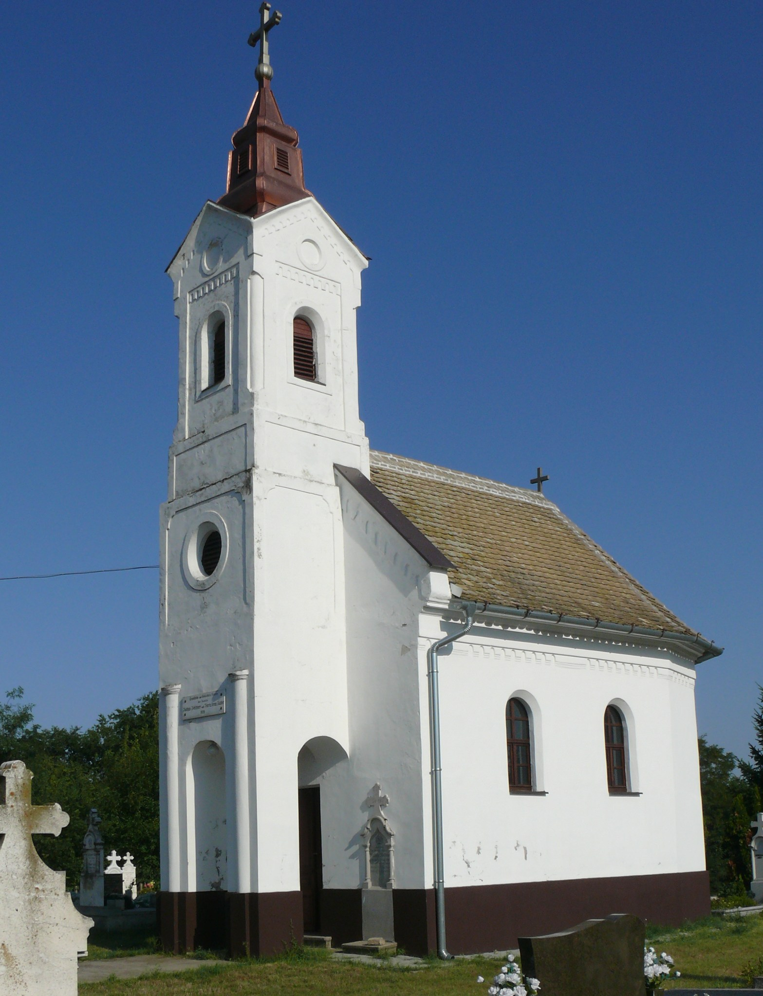 Temetői kápolna Vaskúton